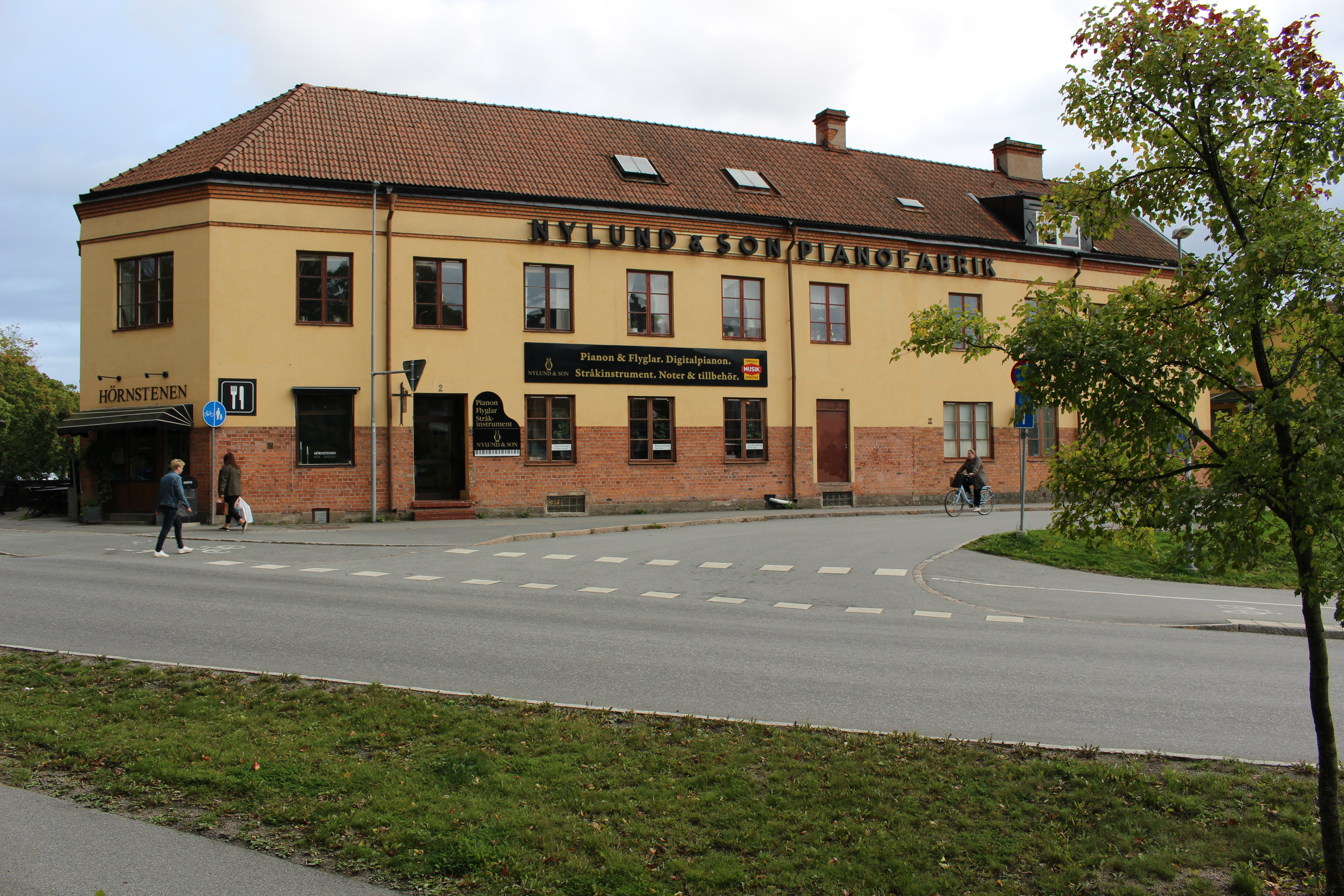 Nylund & Son.